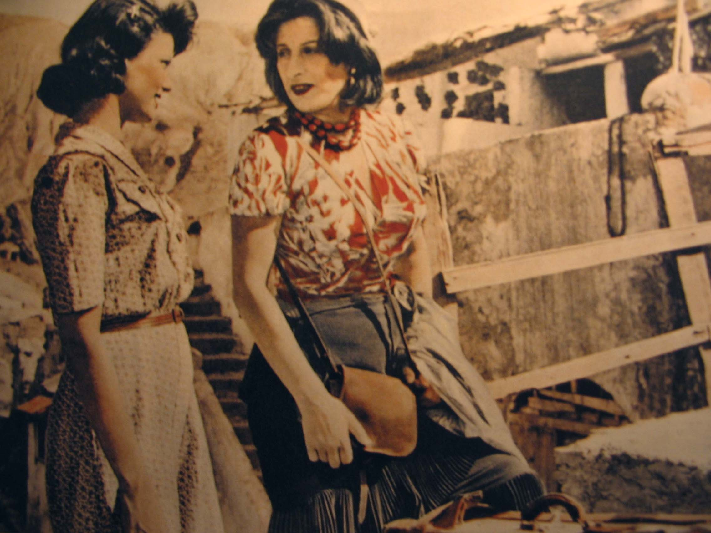 Anna Magnani in una scena del film Vulcano. Licensing Categoria:Immagini di Anna Magnani